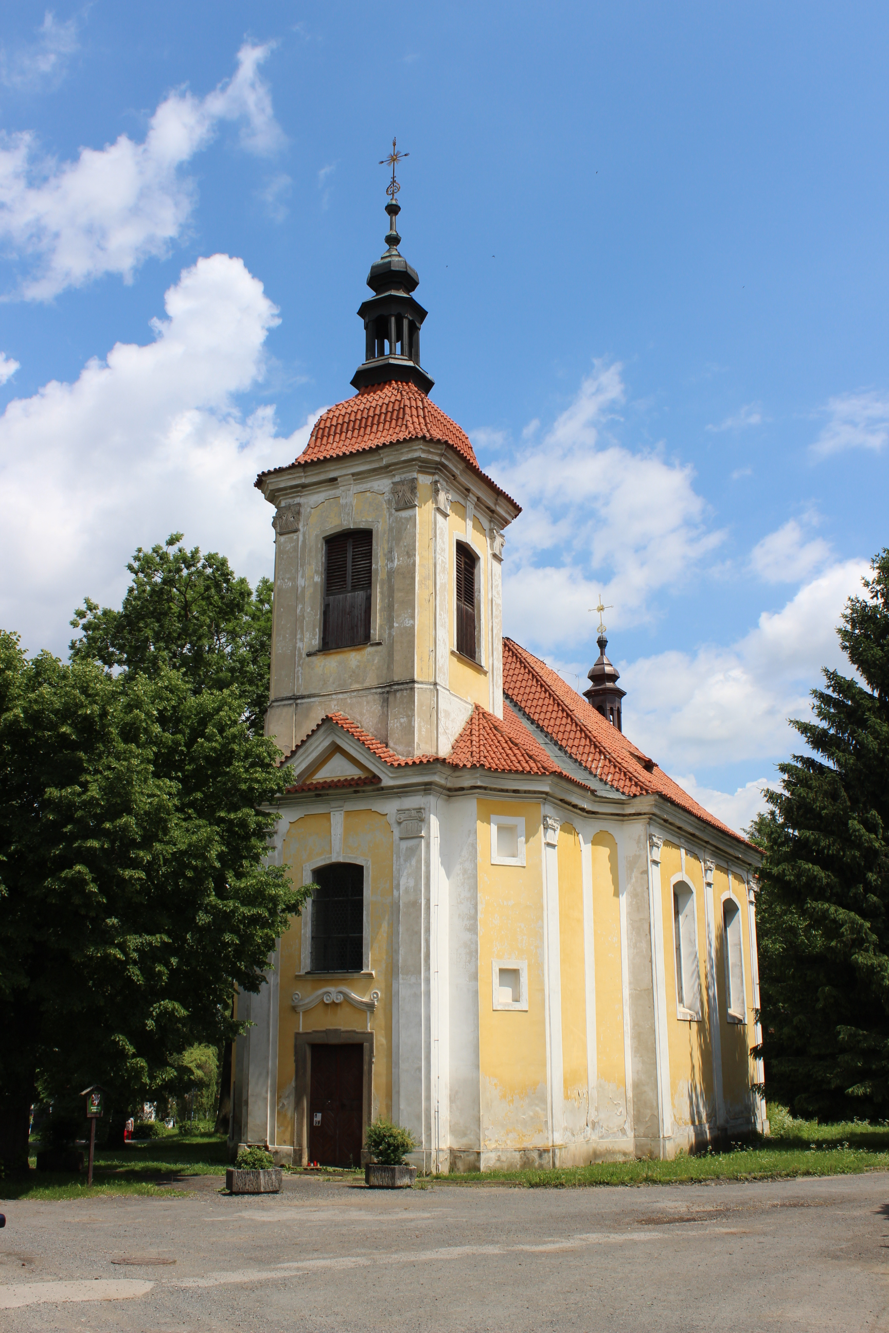 Kostel Všech svatých v Bratronicích v kladenském okrese.